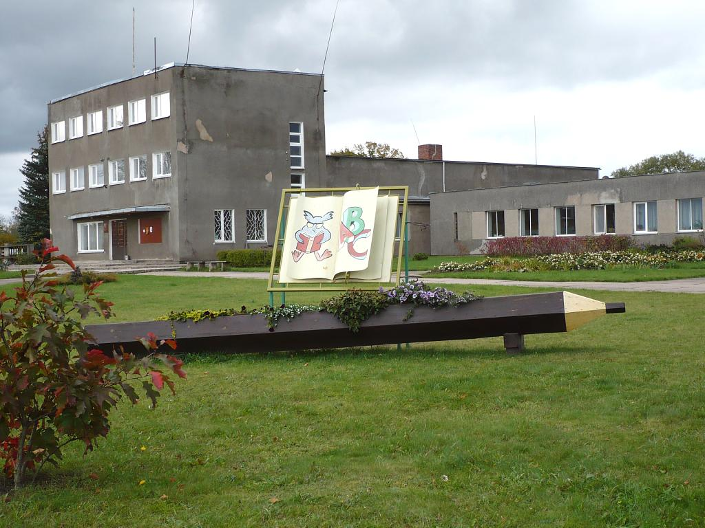 Variņu kultūras nams 2007-10-06